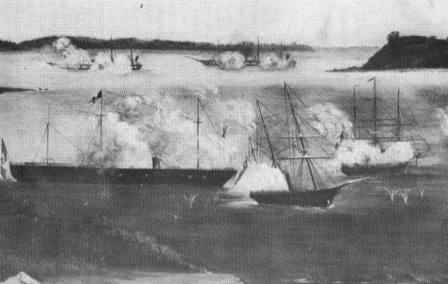 Combat naval d'Abtao 1866. Gravure contemporaine de l'évènement. La flotte péruano-chilienne au premier plan affronte deux frégates espagnoles, au fond.